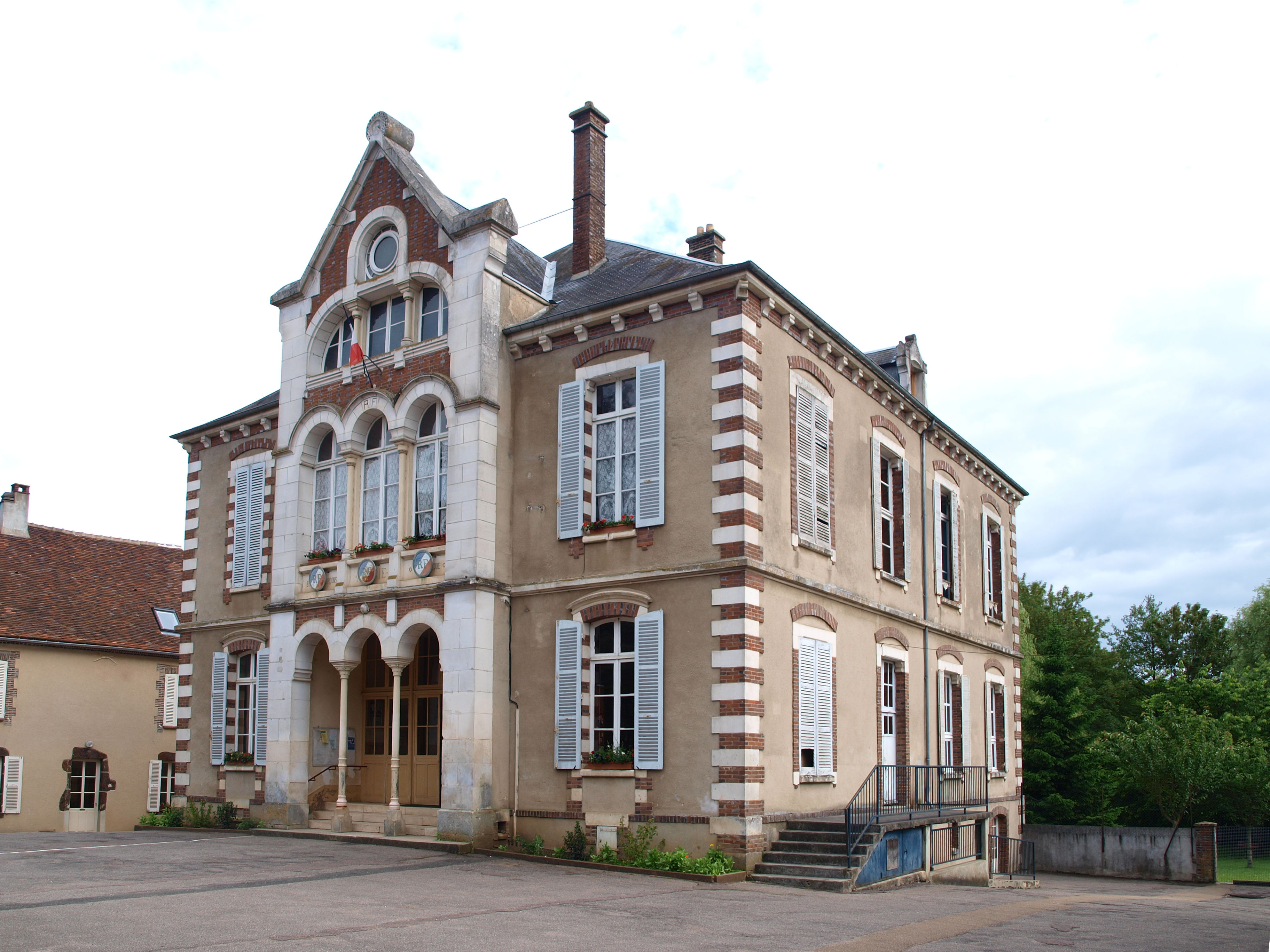 Villiers-Saint-Benoît (Yonne, France) , mairie-école